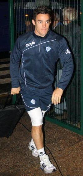 Max Evans du club de rugby à XV Castres olympique.